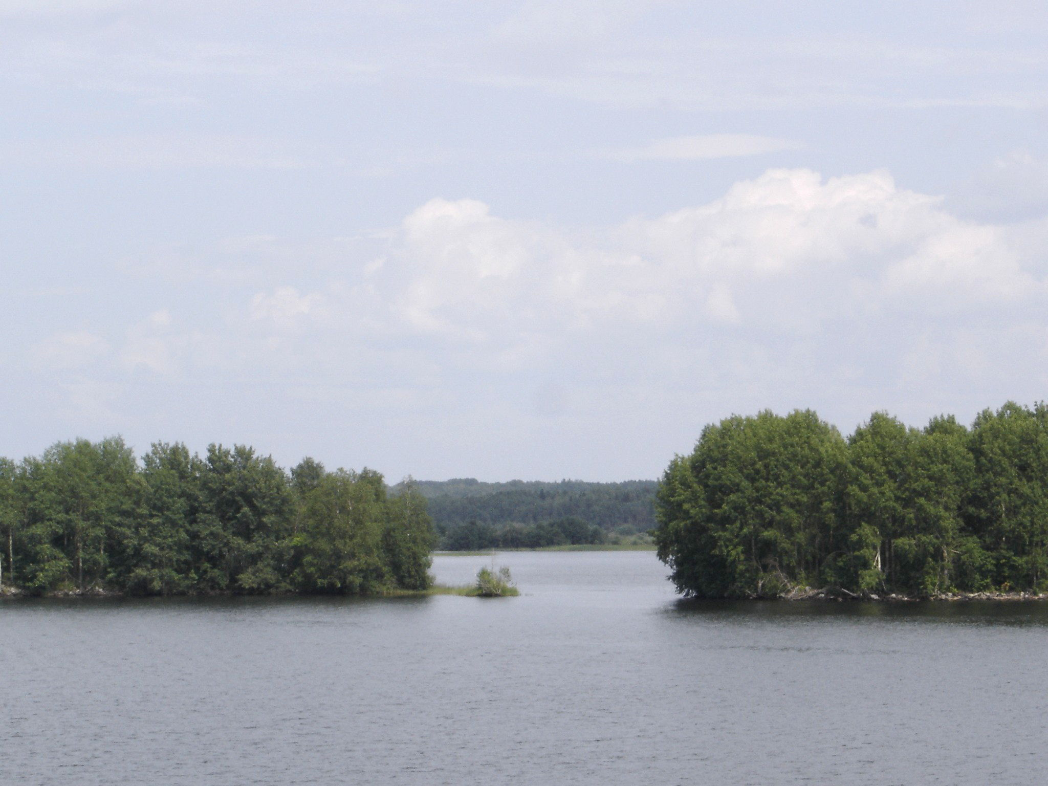 Lac Onega (Russie)